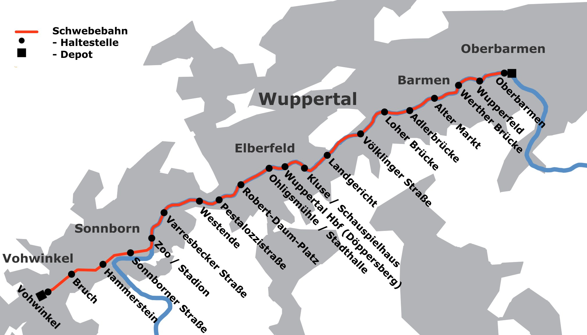 Karte der Wuppertaler Schwebebahn, Zustand im Jahr 2006